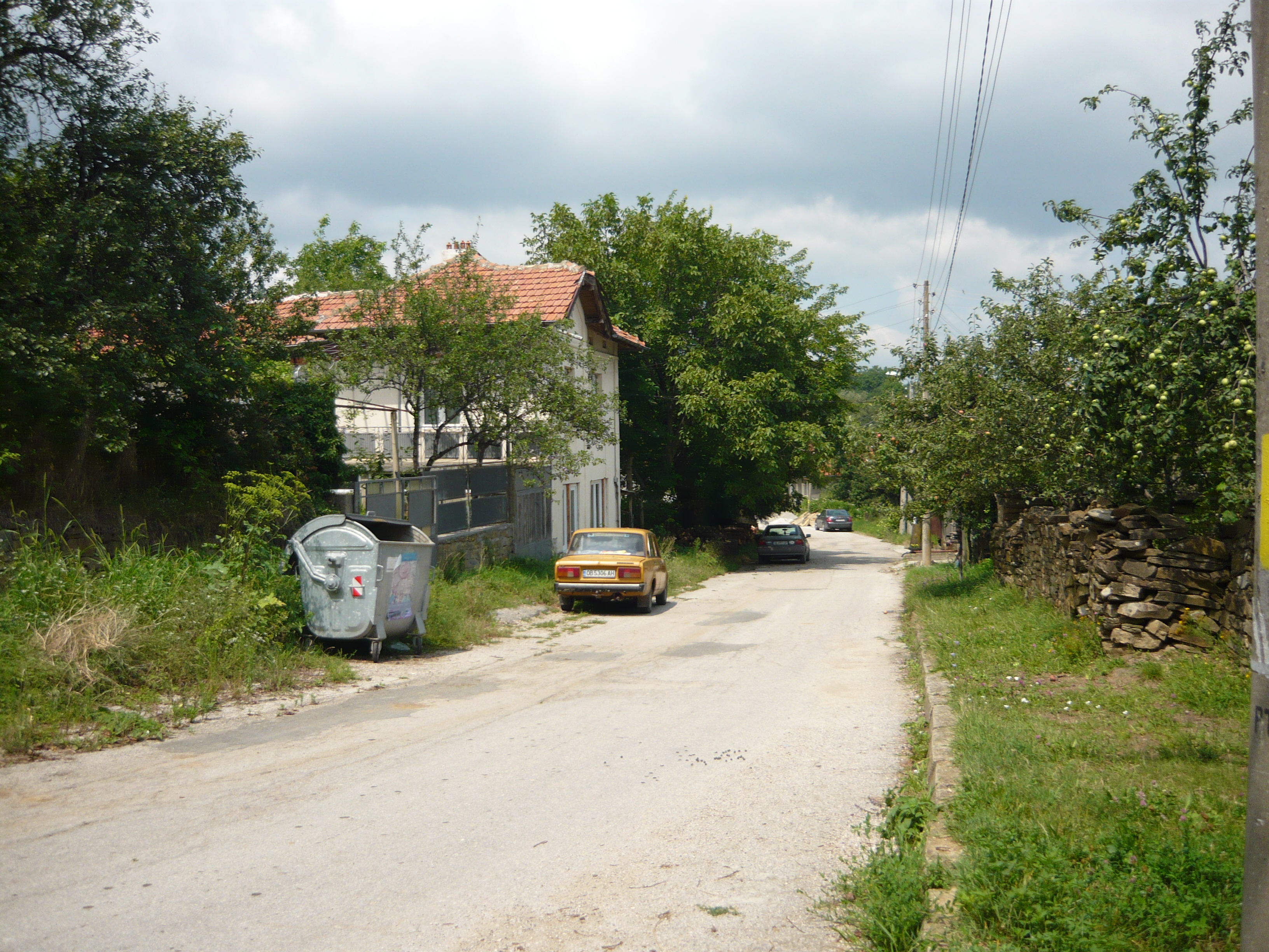 няма